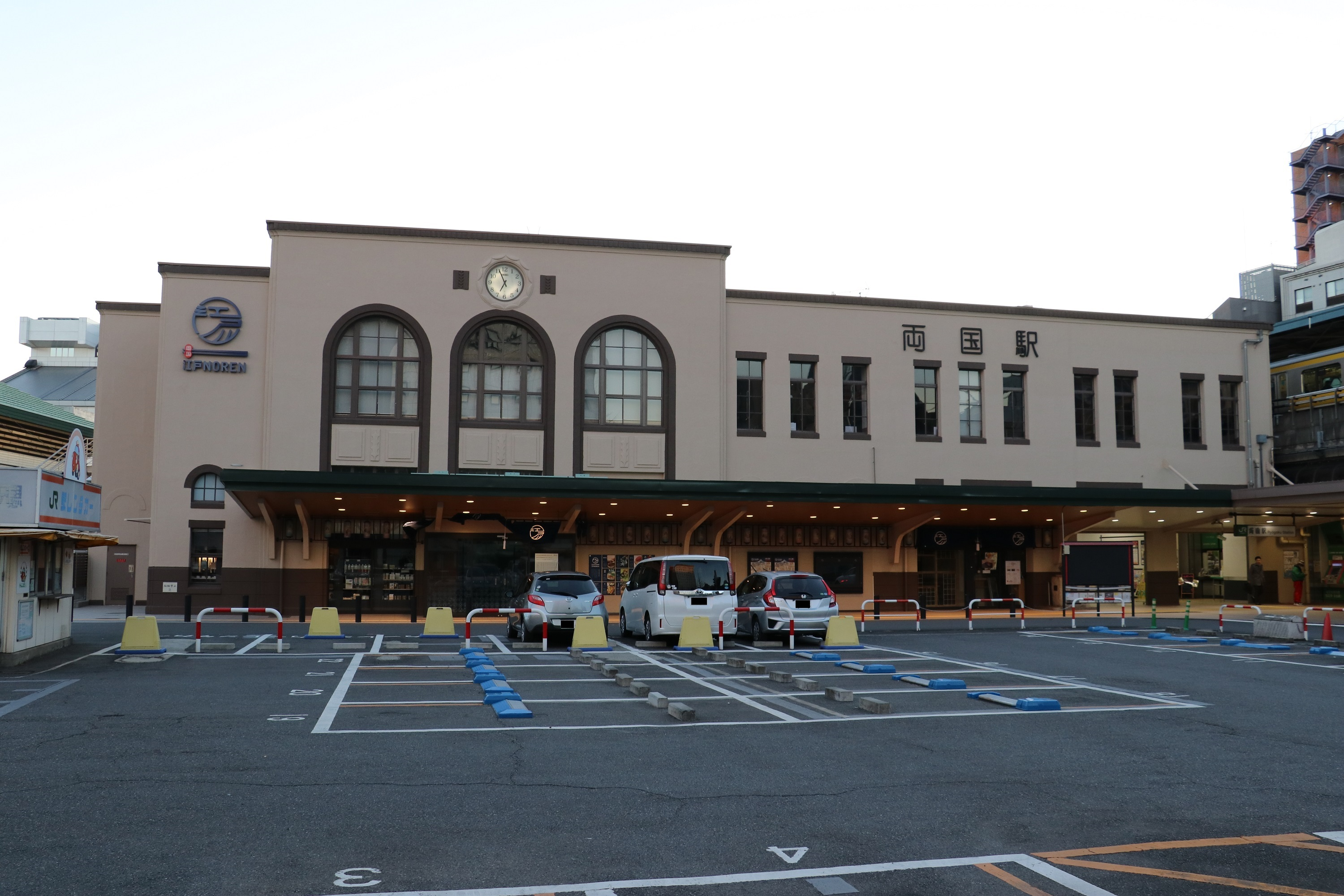 総武本線両国駅